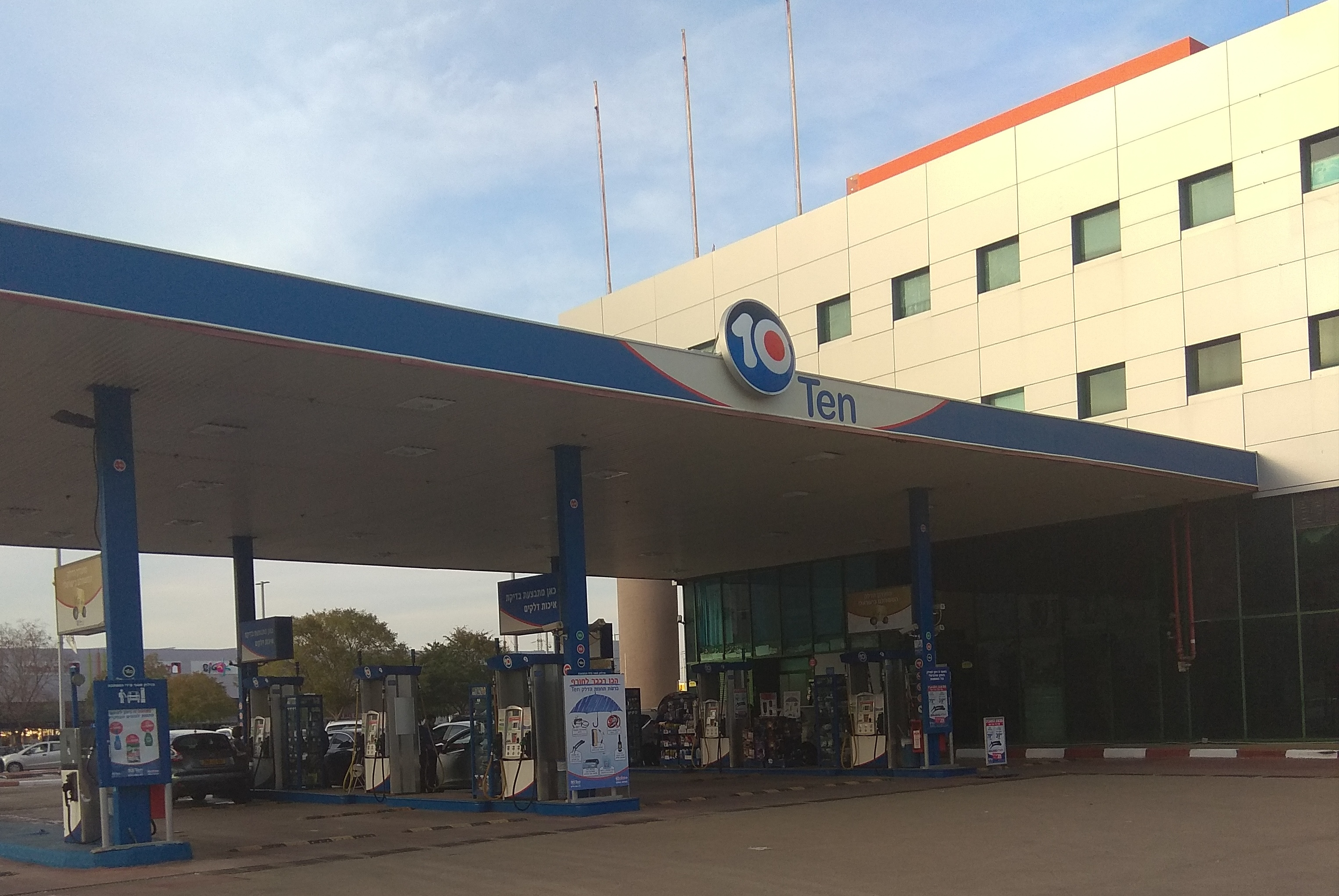 תחנת דלק טן בנשר